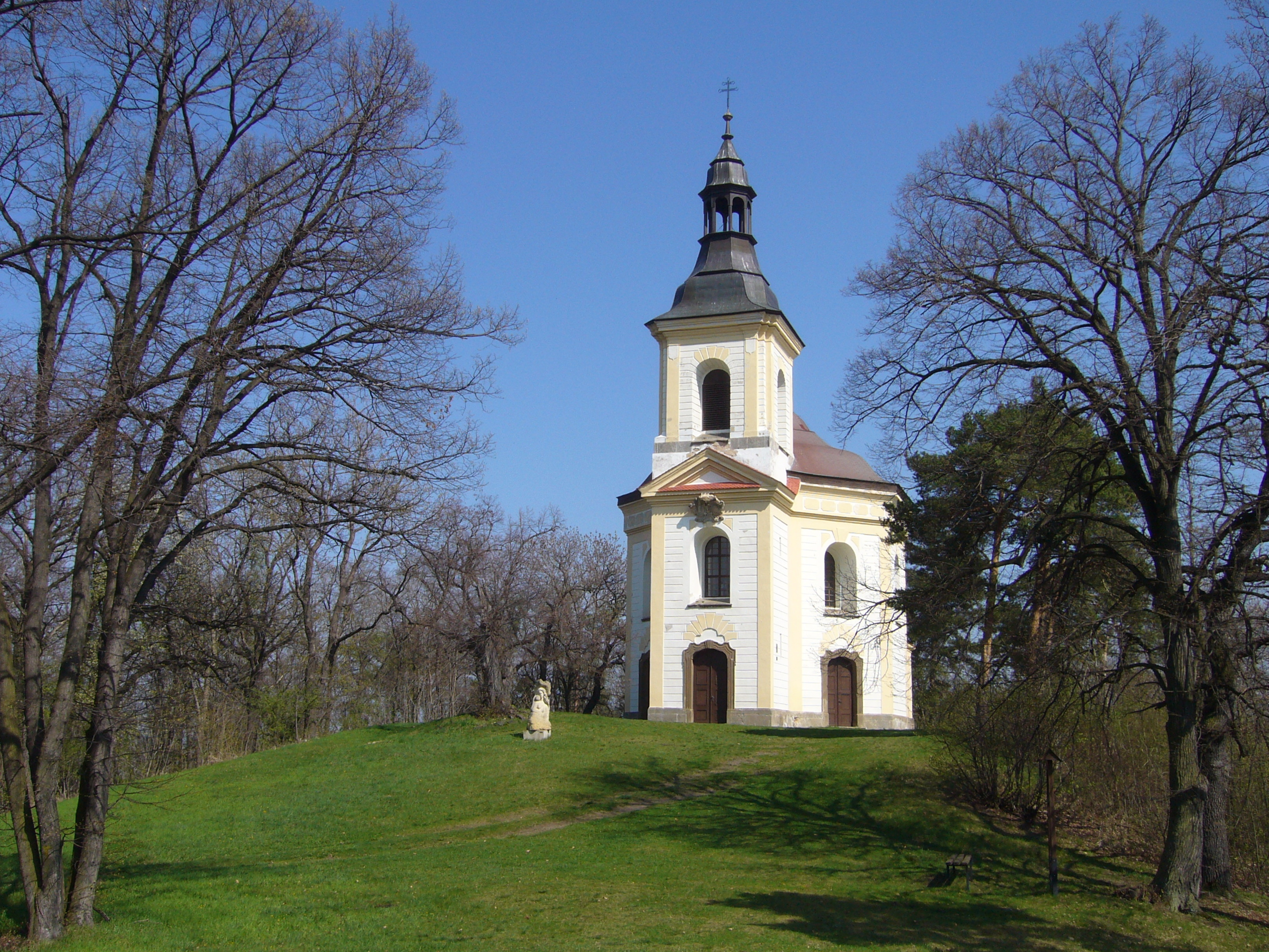 Kaple P. Marie (Vintířov), na vrchu u Vintířova, Vintířov